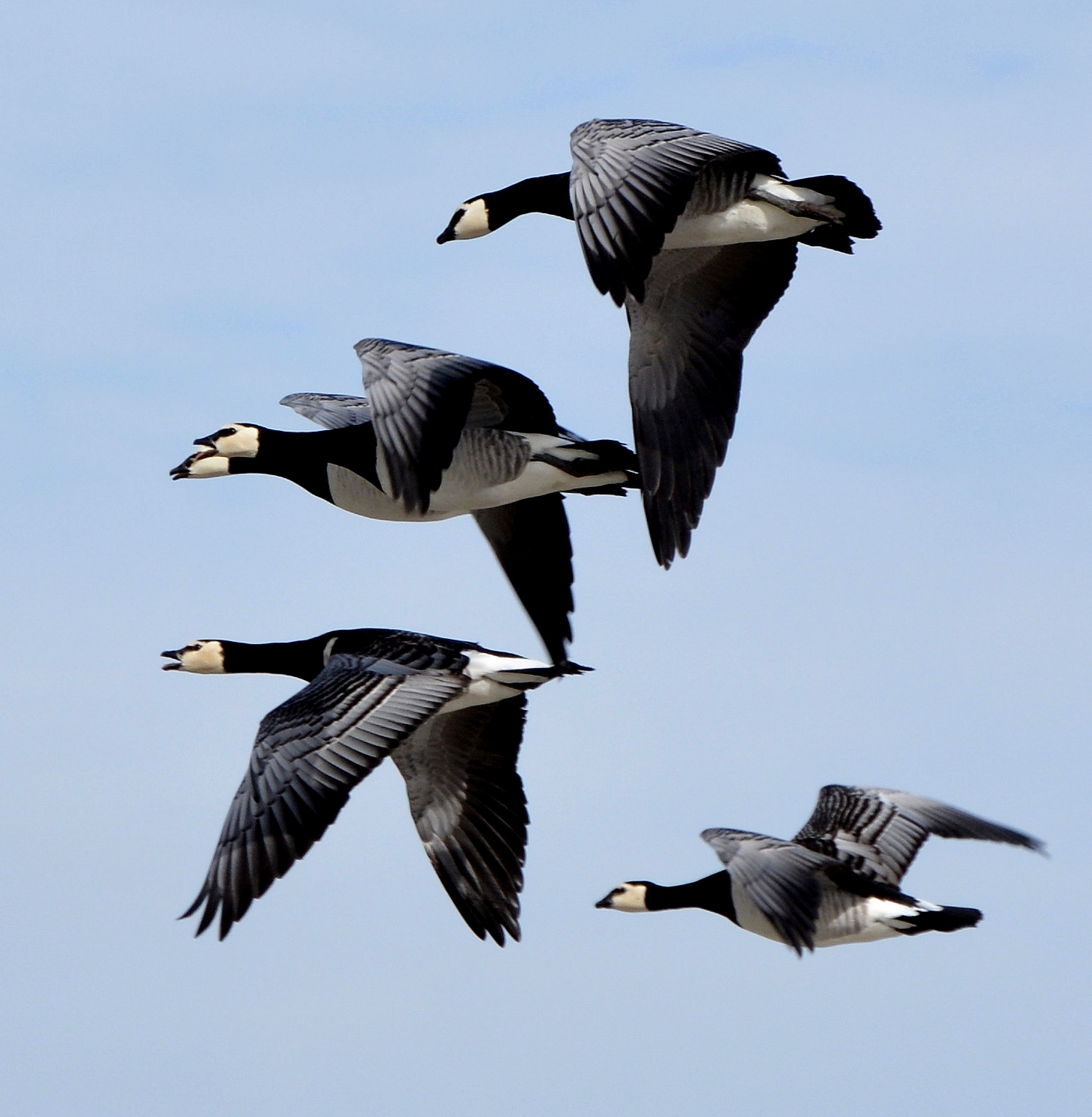 Weißwangengänse (Branta leucopsis), auch Nonnengänse genannt, im Flug am Starnberger See.